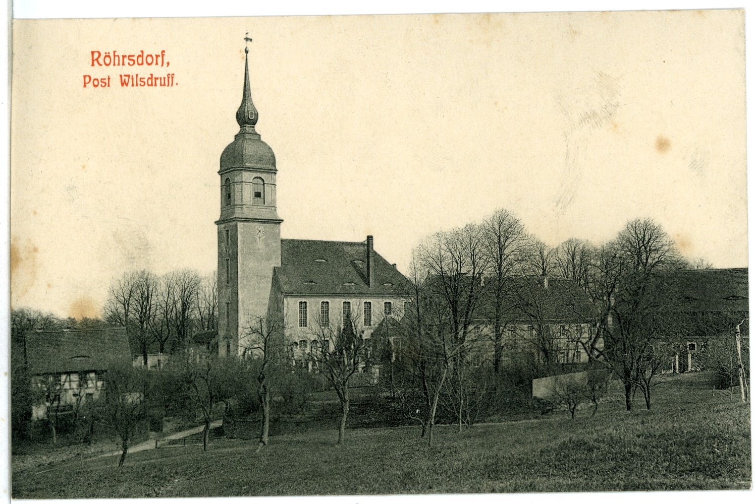 Röhrsdorf; Kirche This postcard is from publisher Brück & Sohn in Meißen ( postcard has a unique number 06297 and is available in a higher resolution at the publisher. This images was uploaded in a cooperation project between Wikipedians and the publisher.